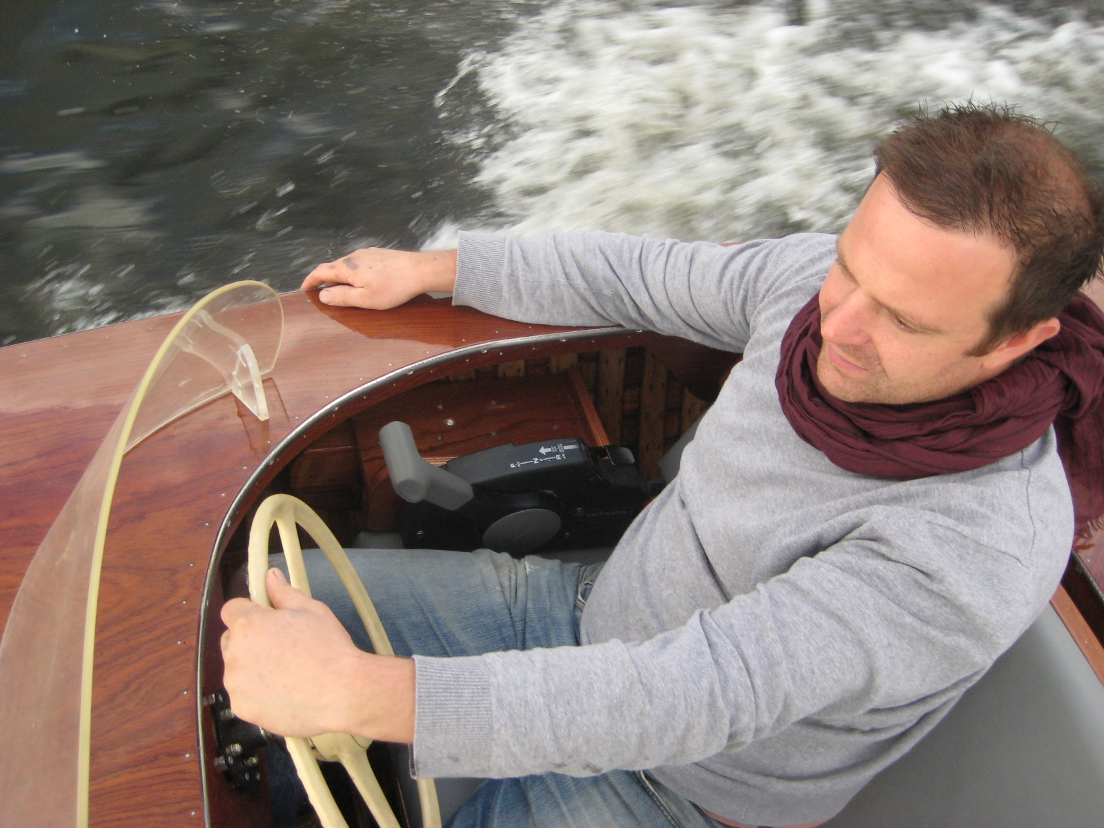 Veenhoven nabij zijn woning.